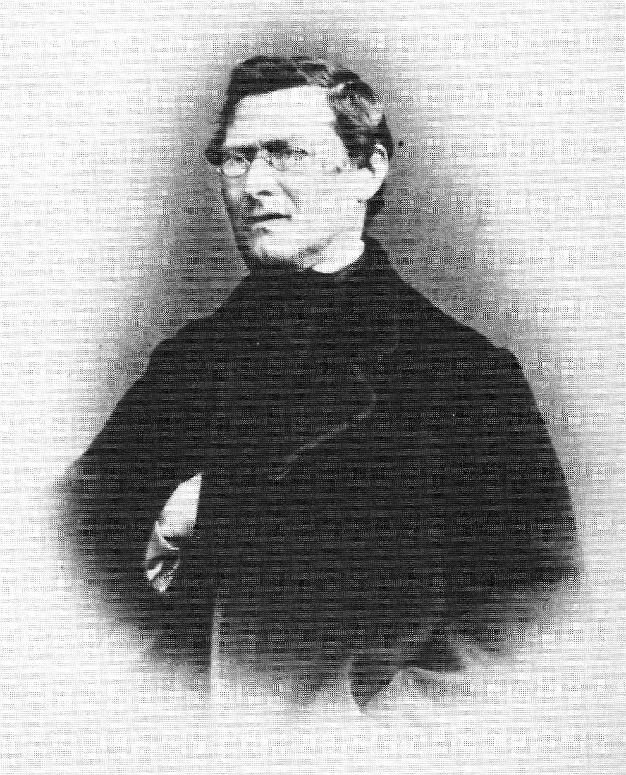 Anton Pfitzer, Foto Städtisches Museum Schwäbisch Gmünd